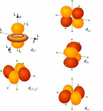 Modelo de orbitales d